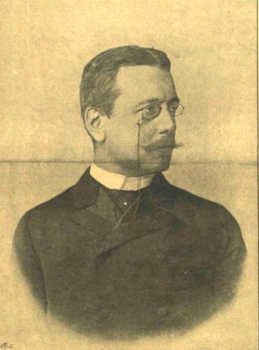 Burián István magyar diplomata, politikus, az Osztrák–Magyar Monarchia közös külügy- és közös pénzügyminisztere.